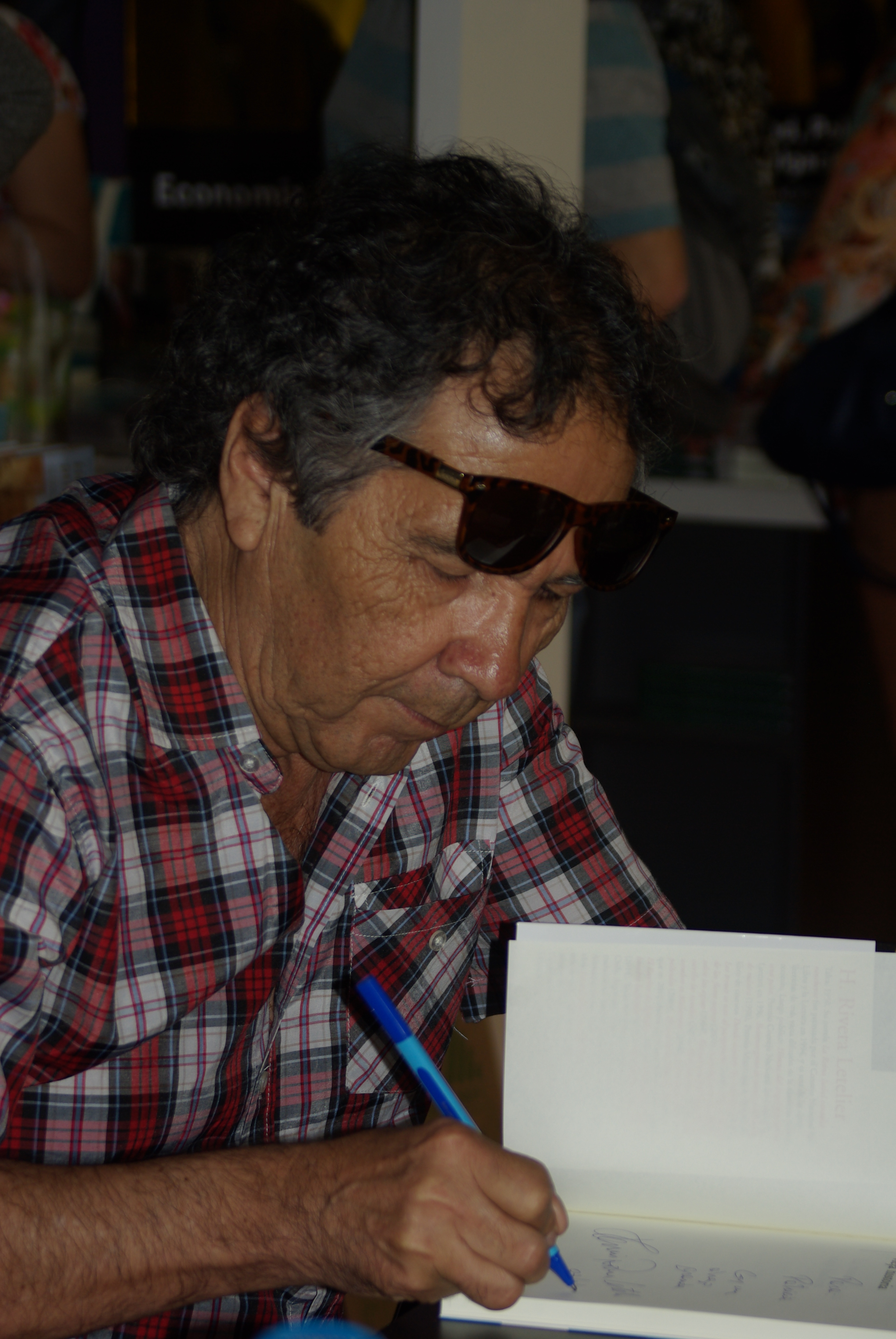 El escritor chileno Hernán Rivera Letelier en la Feria Internacional del Libro de Santiago 2015